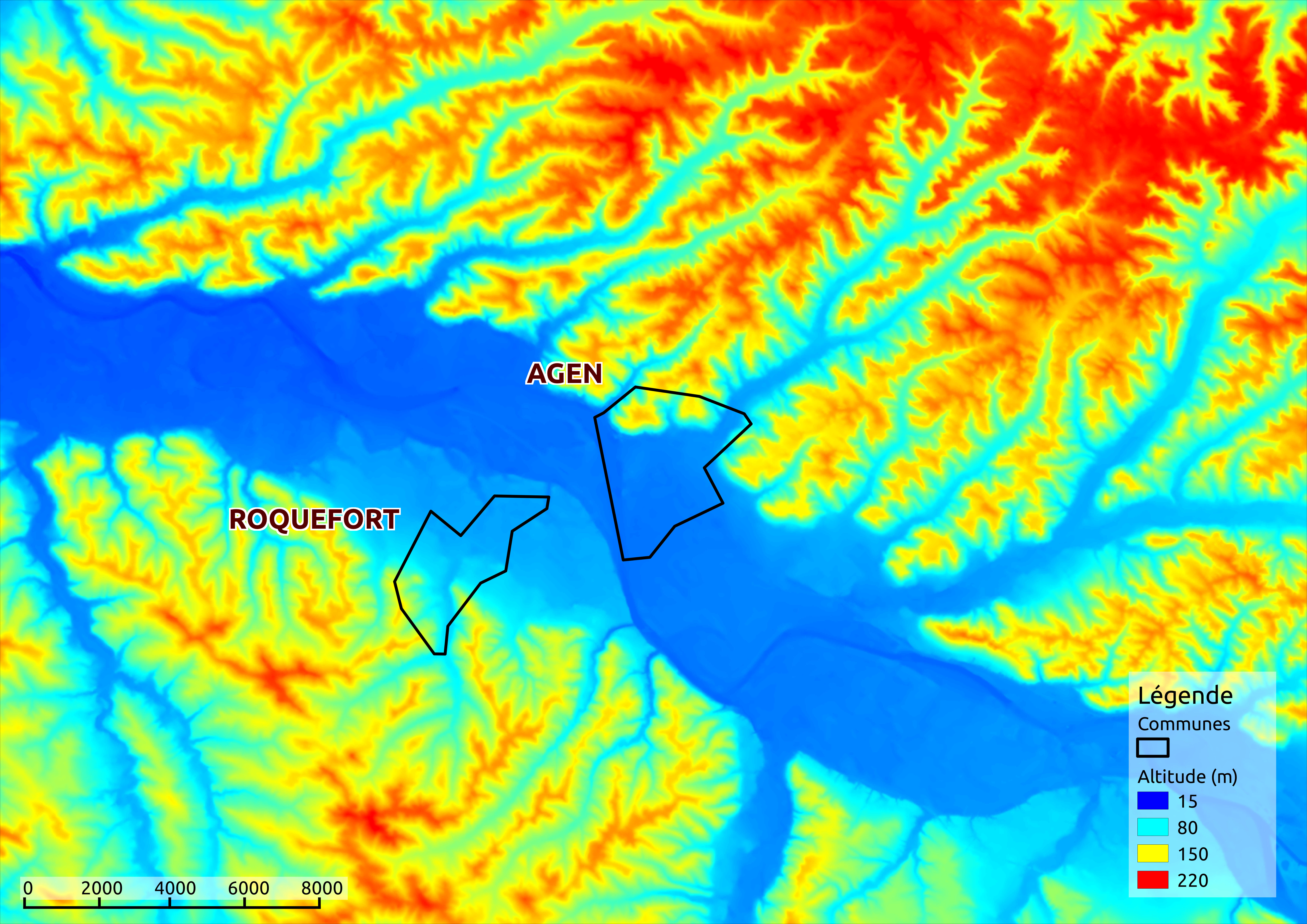 Situation du village de Roquefort au bord de La Garonne et relief environnant (Lot et Garonne, France)